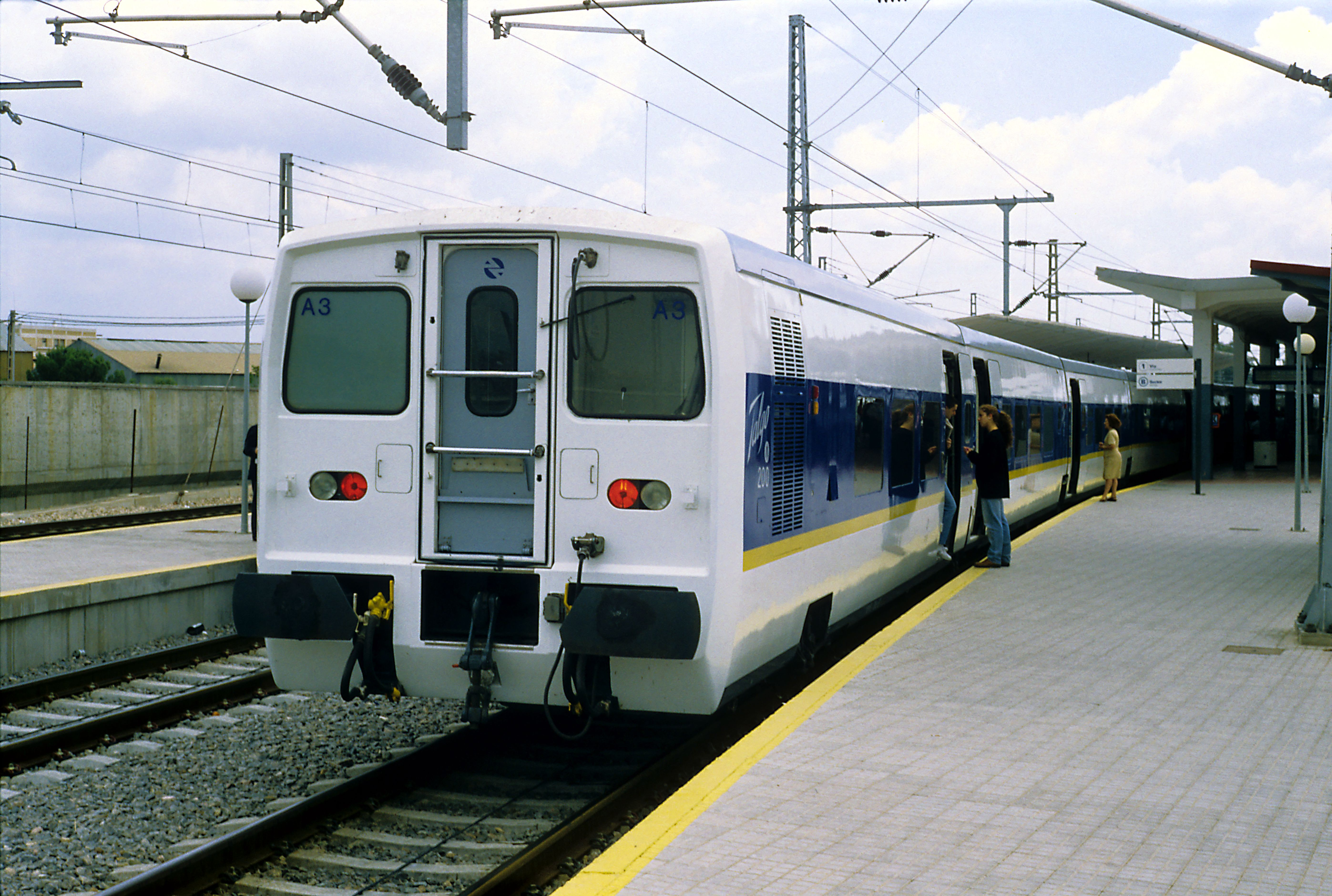 Talgo 200 (Talgo VI) Málaga–Madrid Atocha mit glänzendem Neulack im Regelspurteil des alten Bf Córdoba C. Hinter dem rechten Fenster befindet sich der Hilfsführerstand mit vollwertiger Wendezugsteuerung, der Wagenübergang ist bei Kupplung mit einer weiteren Talgo-Pendular-Einheit während der Fahrt benutzbar und wird von einem Faltenbalg umschlossen.